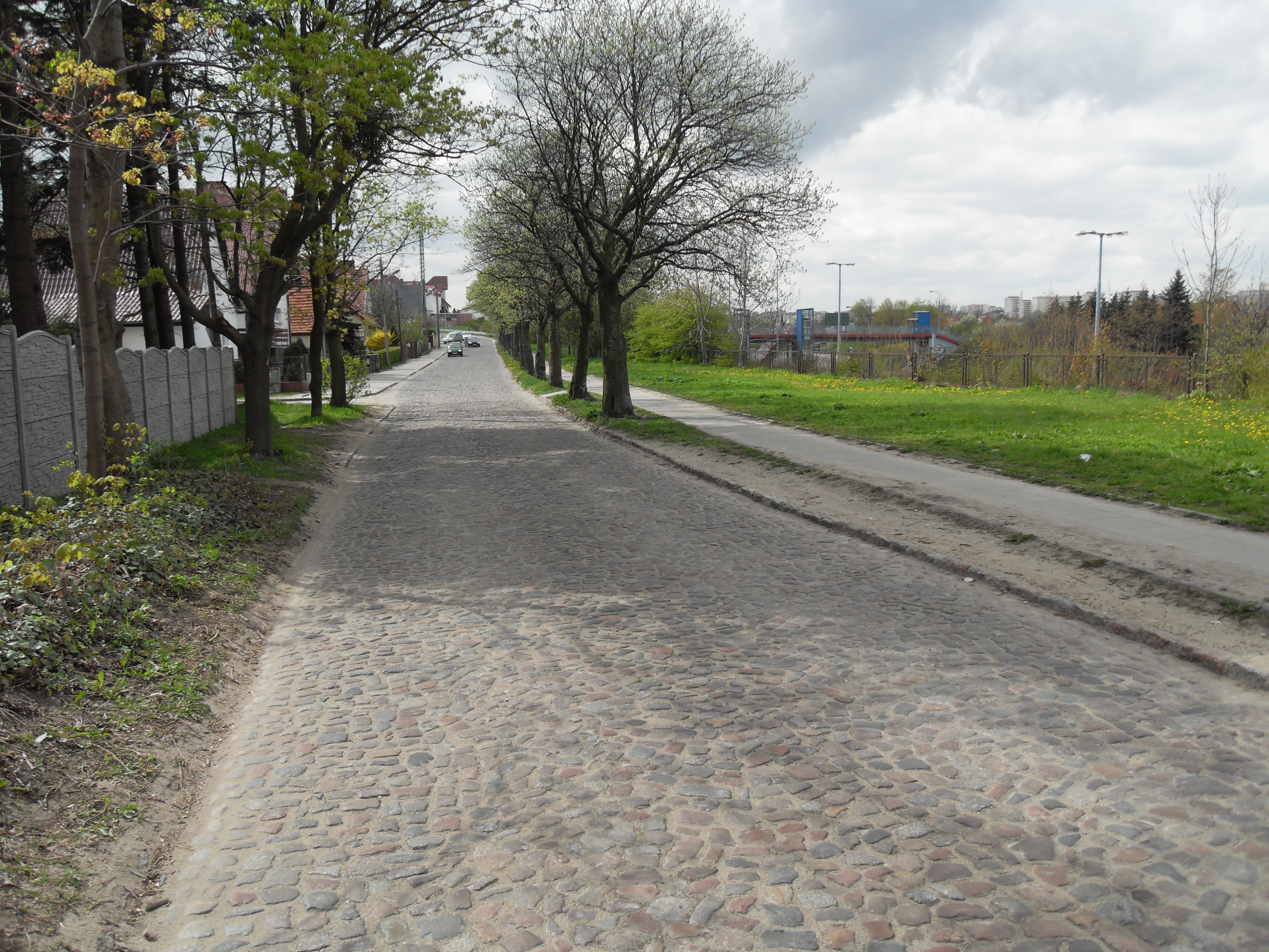 Gdańsk Chełm, ul. Lubuska.